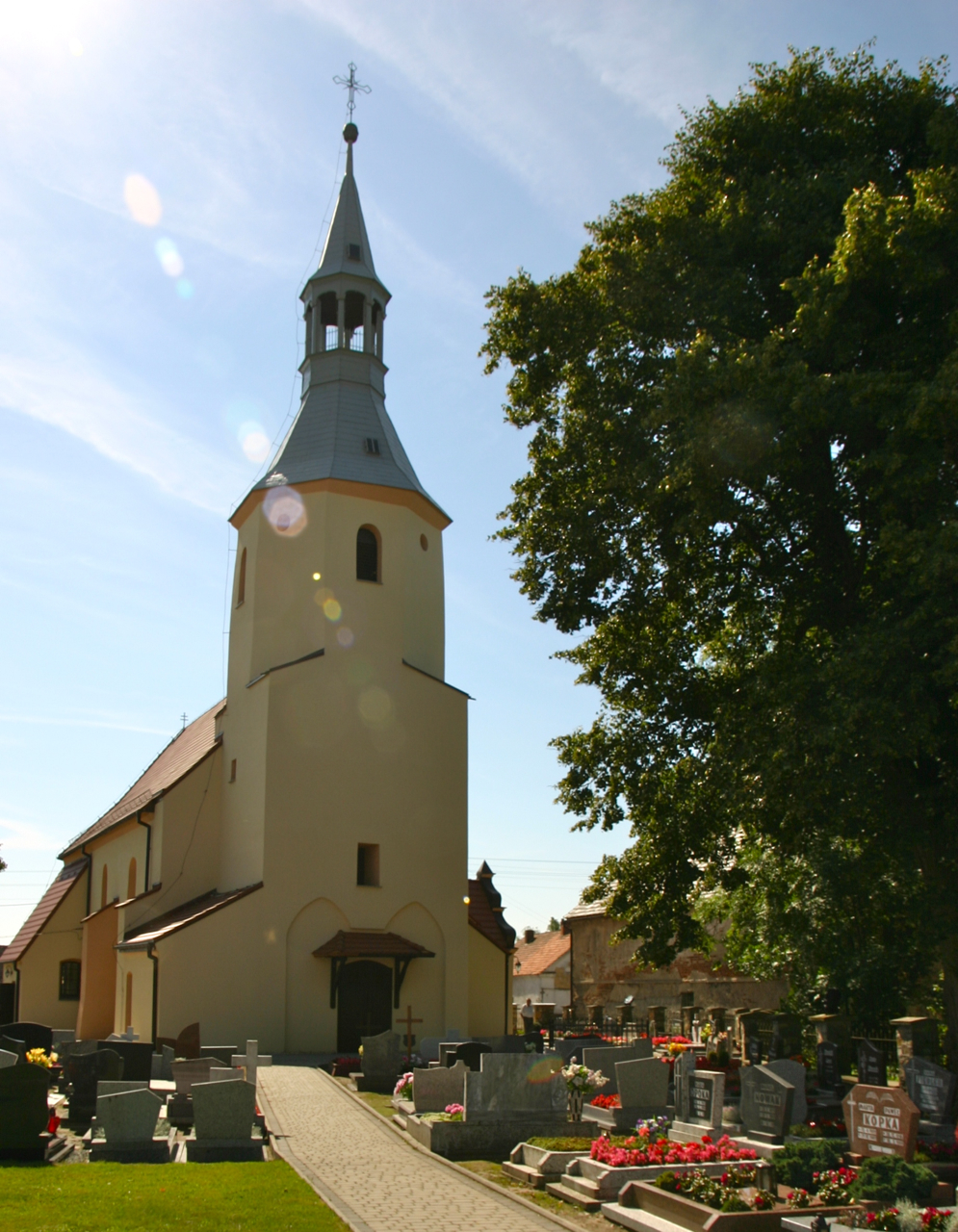 Pisarzowice (dodatkowa nazwa w j. niem. Schreibersdorf) – wieś w Polsce położona w województwie opolskim, w powiecie krapkowickim, w gminie Strzeleczki.